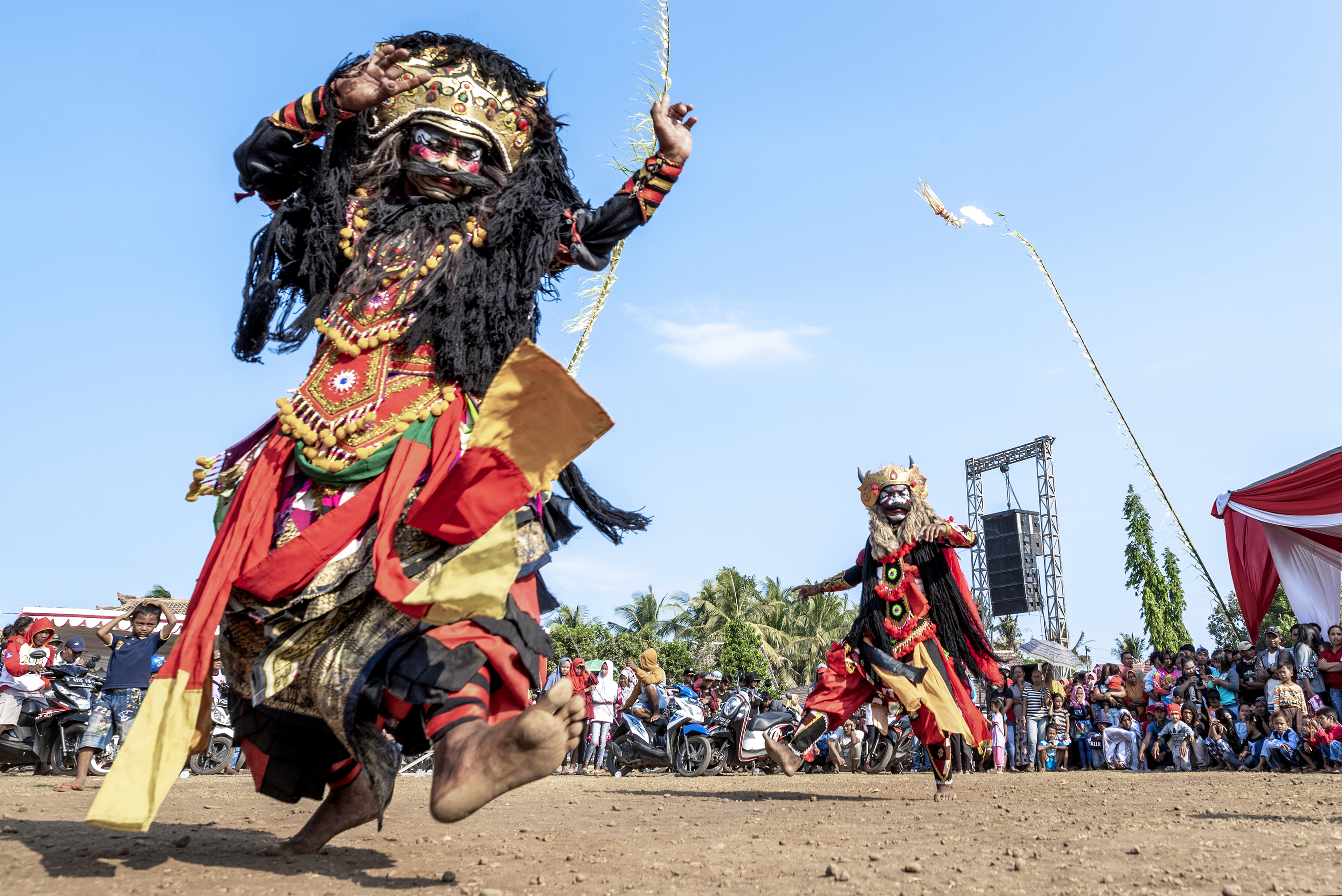 pentas kuda lumping jaranan di desa wonorejo kabupaten Situbondo